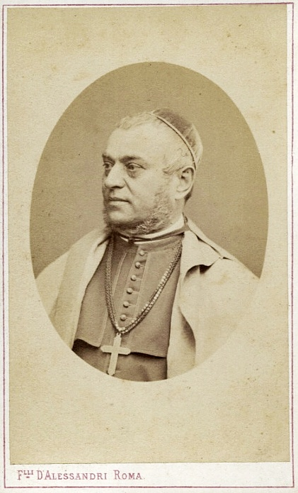 Erzbischof Ioan Vancea von Făgăraș und Alba Iulia in Rumänien (1820-1892)